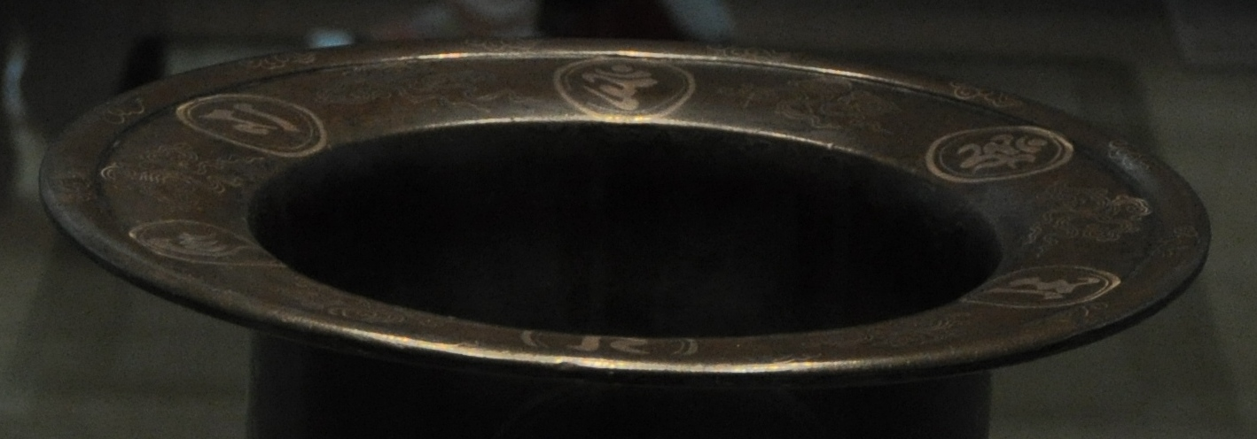 표충사 청동 은입사 향완 (국보 제57호)의 윗 부분